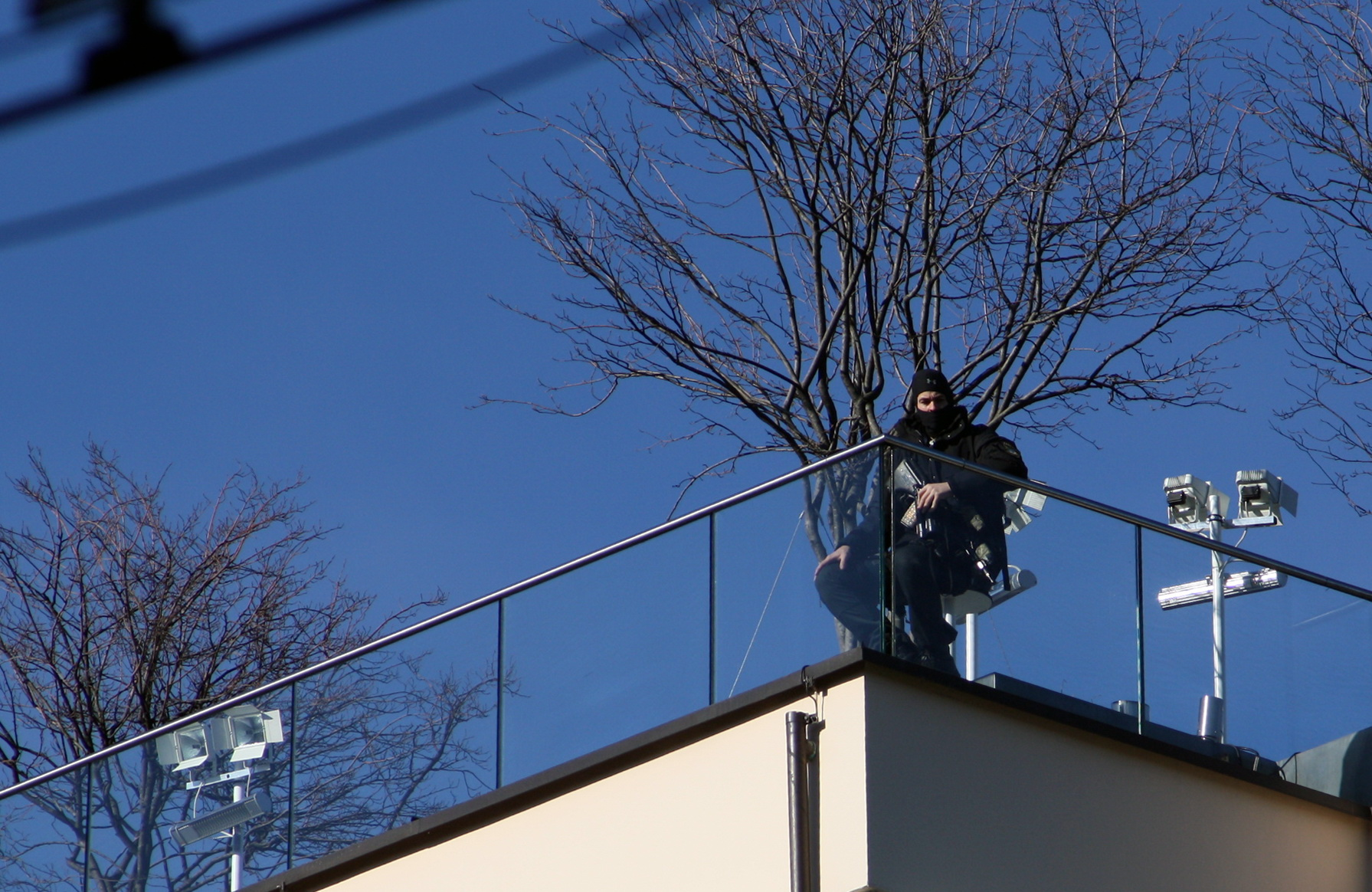 Angehöriger des Sondereinsatzkommandos auf dem Dach des Hotels Bayrischer Hof in München. Der Beamte ist mit einem Steyr AUG bewaffnet.